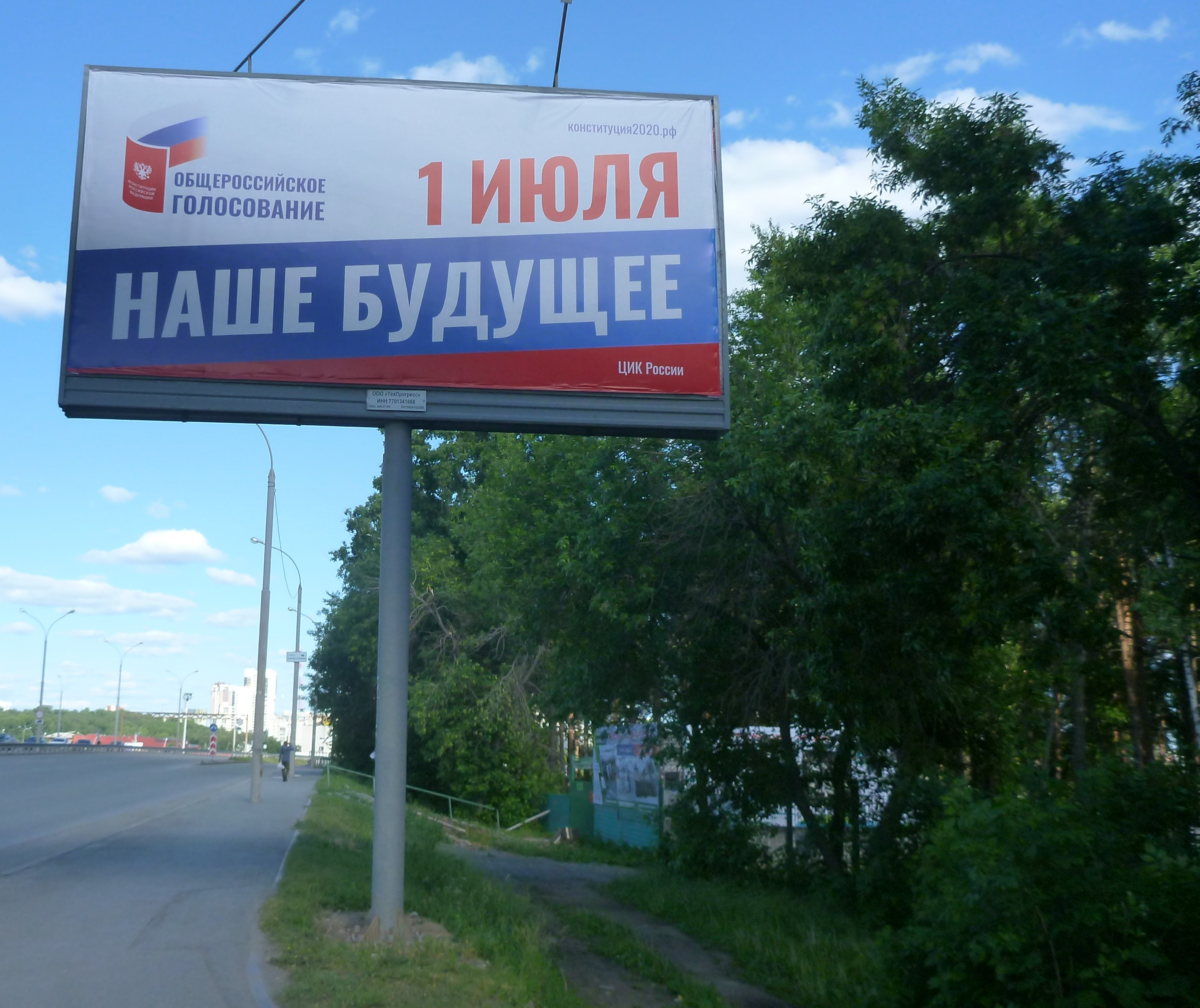 Щит ЦИК России за голосовании по поправкам к Конституции России 13 июня 2020 года